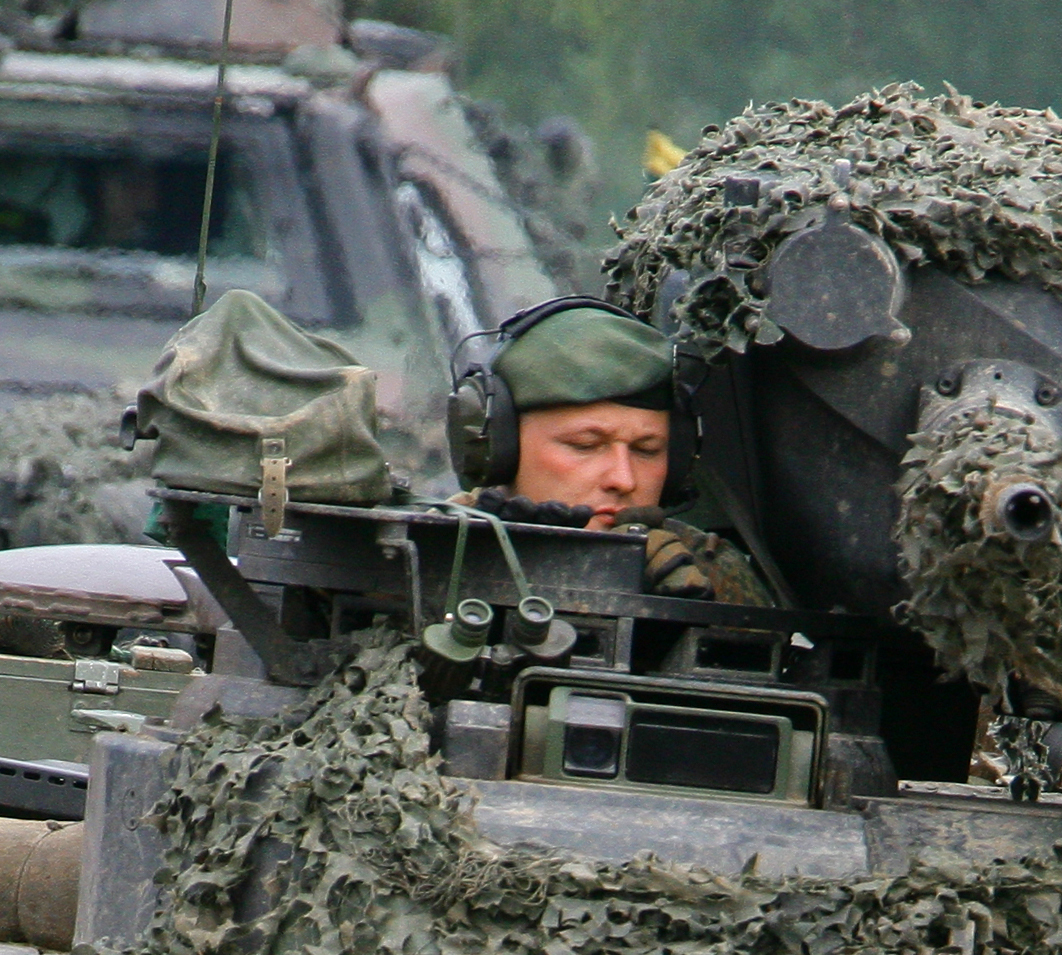 Der Schützenpanzer Marder 1A3 bei der Informationslehrübung Heer am Ausbildungszentrum Munster. Im Hintergrund der Transportpanzer Fuchs. ©Bundeswehr/Rott